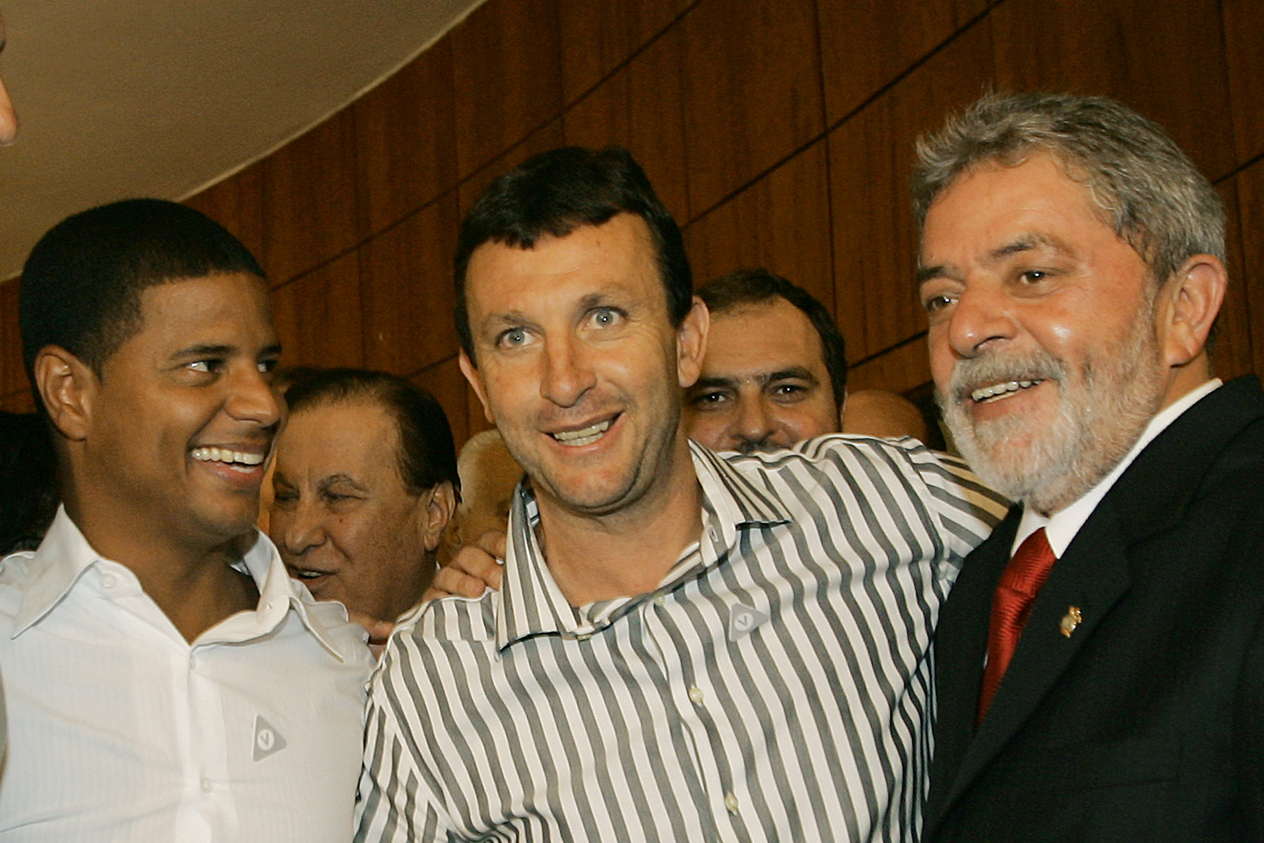 135919 São Paulo (SP) - Presidente Lula ao lado de Marcelinho Carioca e Neto, dois grandes ídolos da história corintiana, durante a inauguração do Memorial do Corinthians.Foto: Ricardo Stuckert/PR